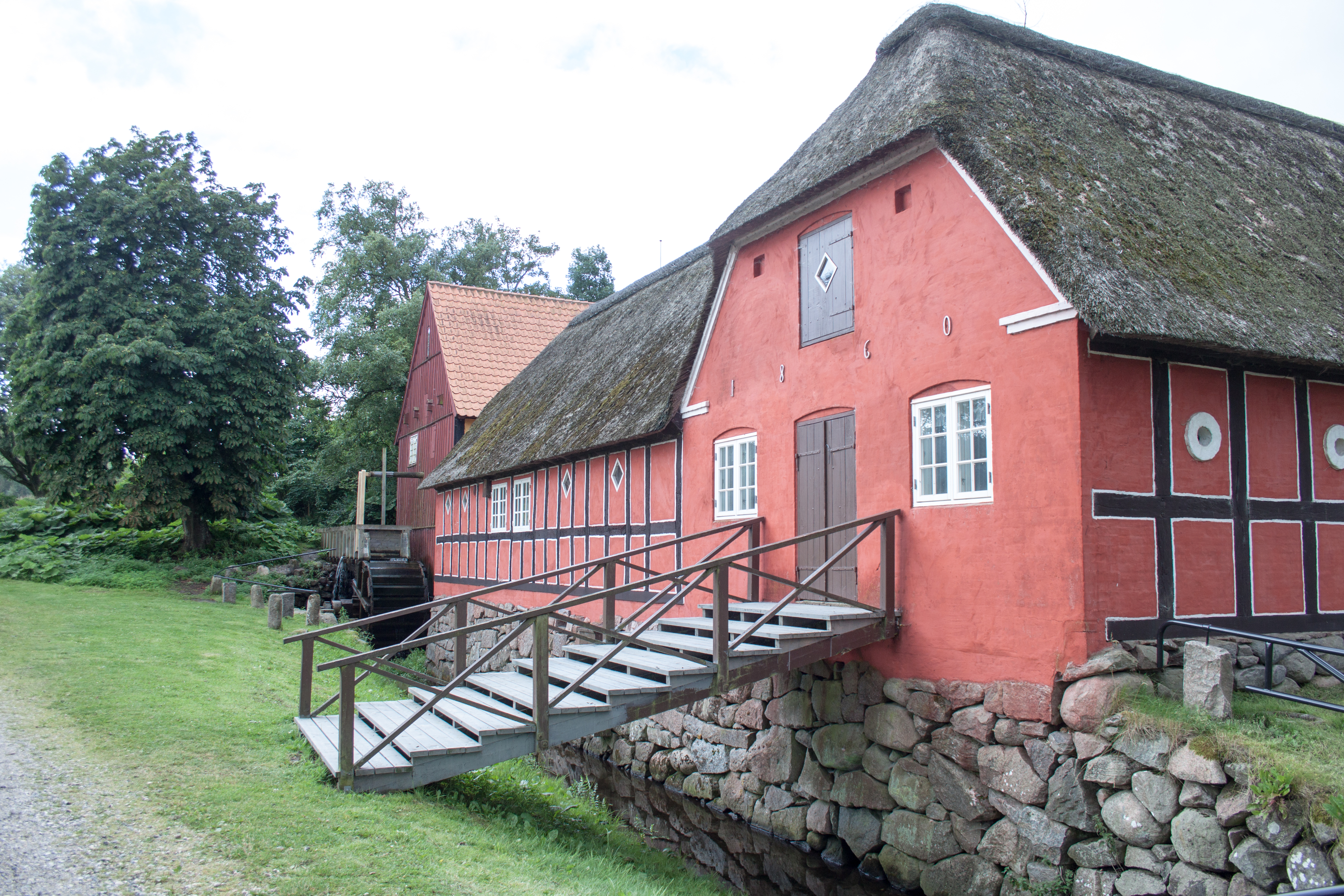 Fyrkat Møllegaard, skansen